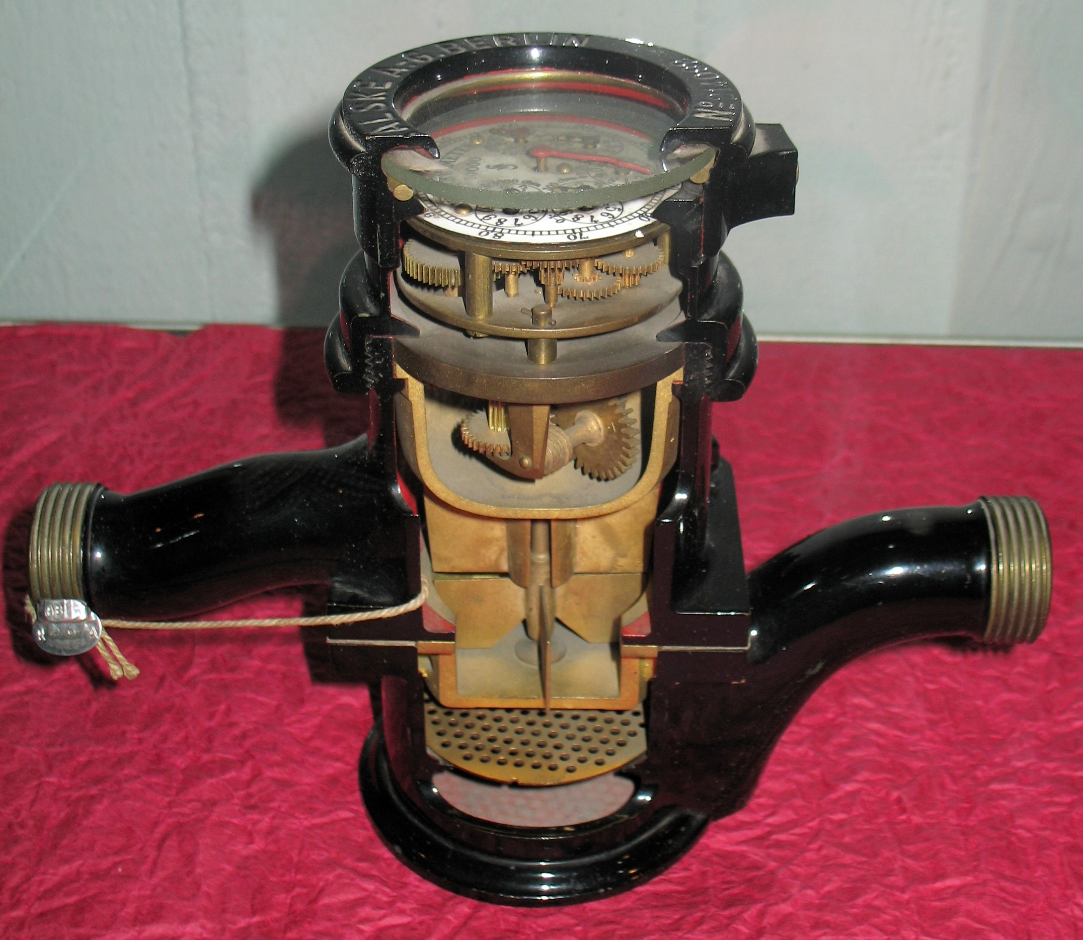 Schnitt durch einen alten Wasserzähler. Fotografiert im Deutschen Museum (Bonn)